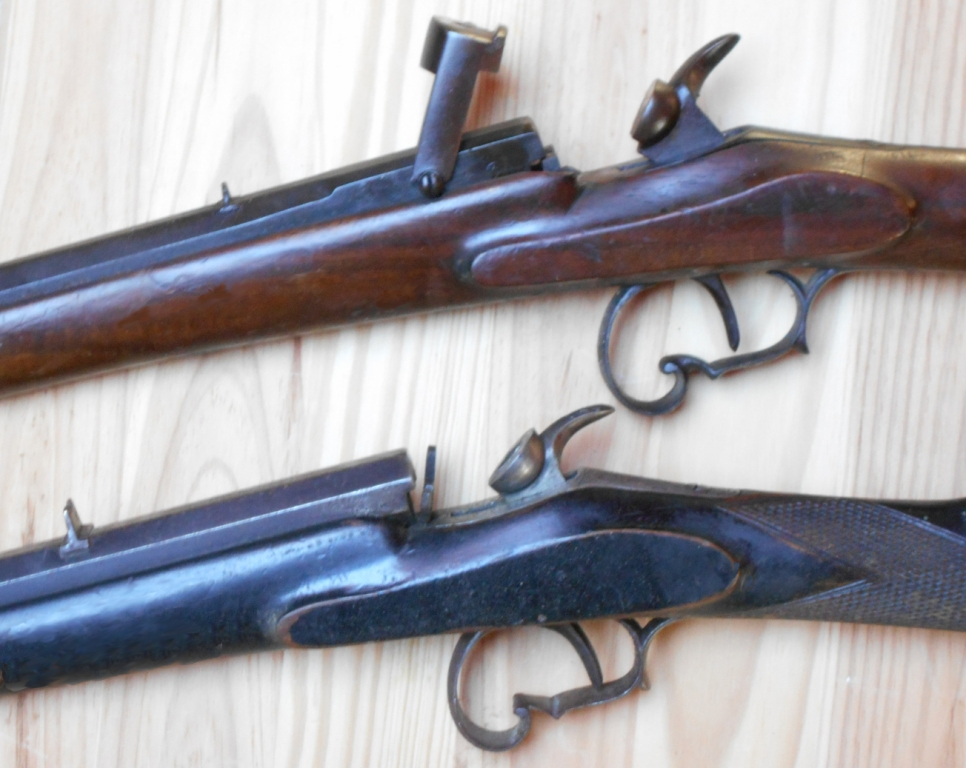 Flobert2 Gewehre